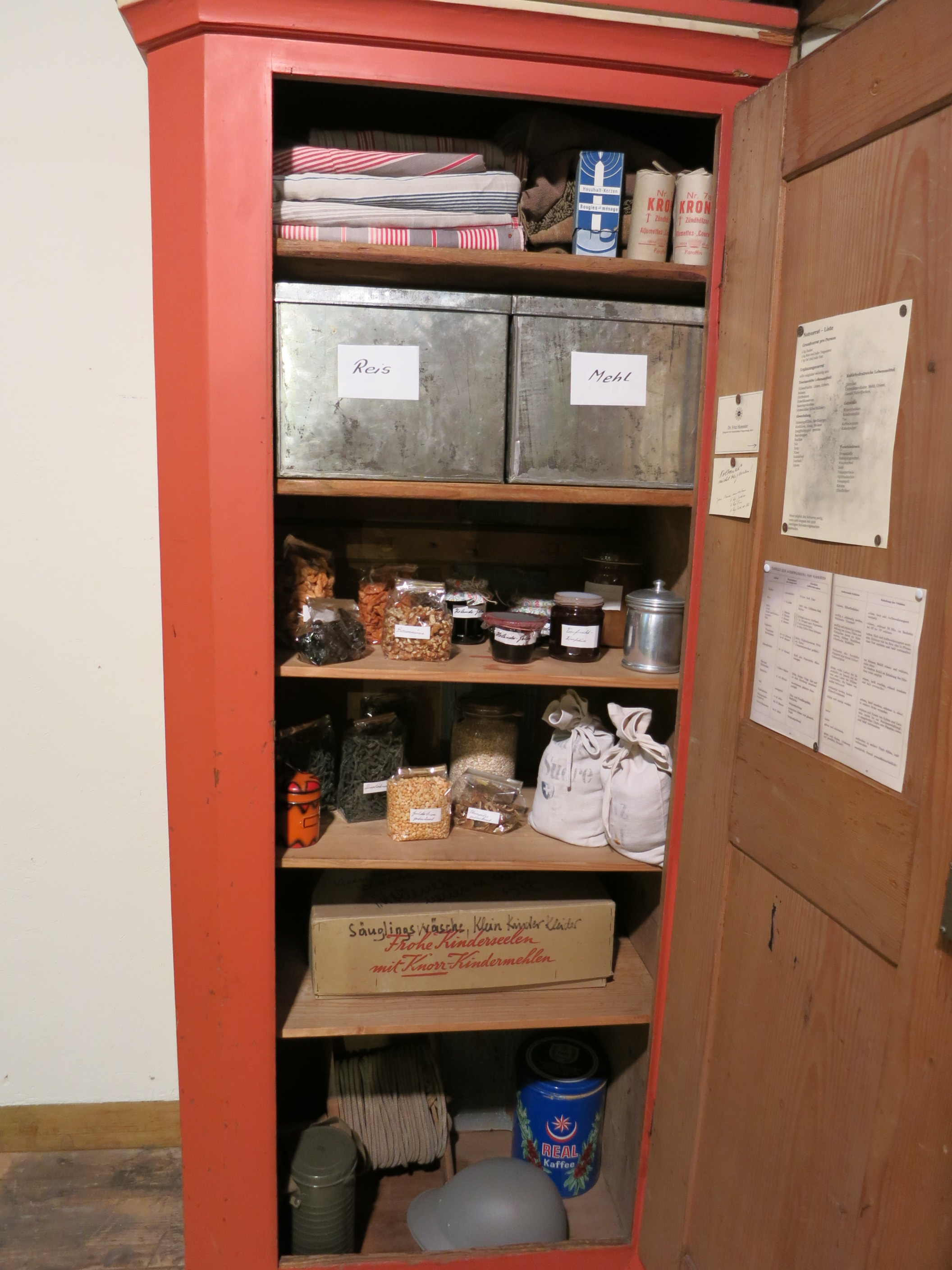 Museum im Zeughaus, Schaffhausen SH, Schweiz